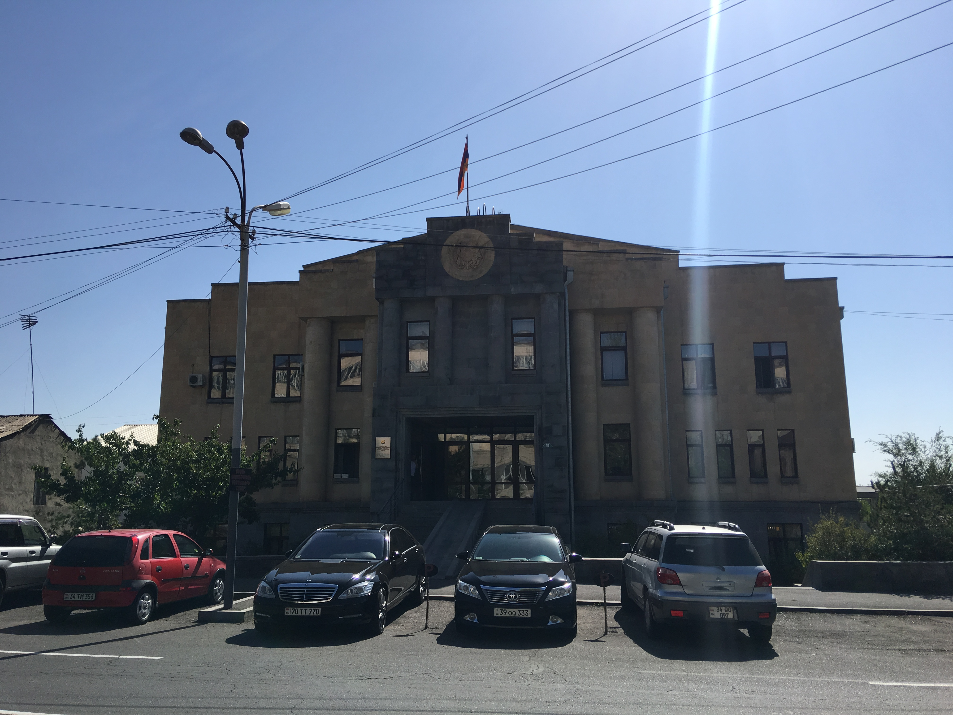 Արաբկիր և Քանաքեռ-Զեյթուն վարչական շրջանների ընդհանուր իրավասության դատարան, Երևան, Հայաստան